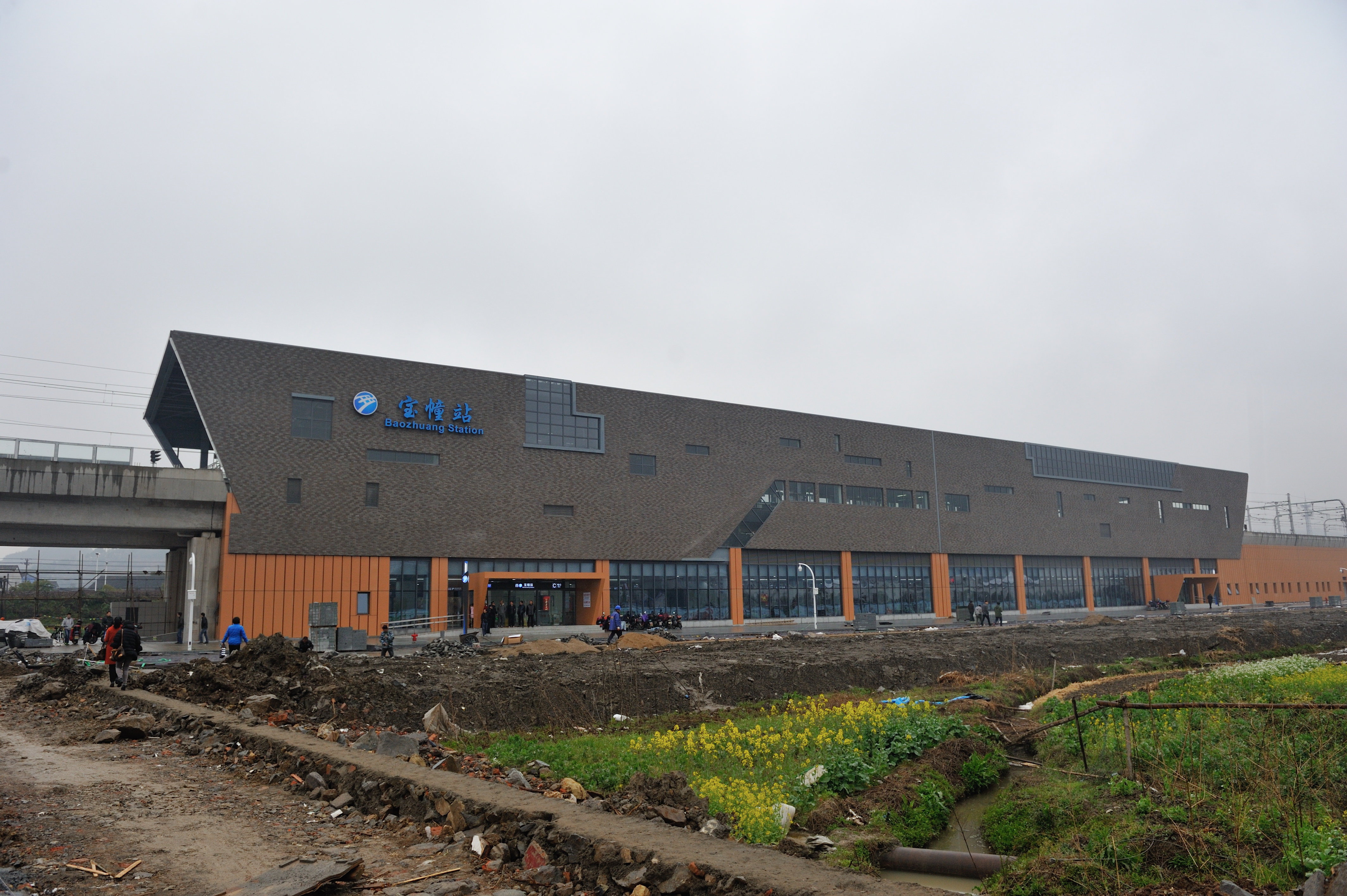 宁波地铁宝幢站